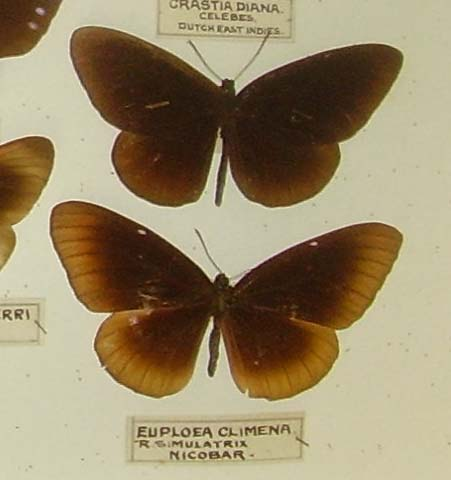 Euploea climena simulatrix